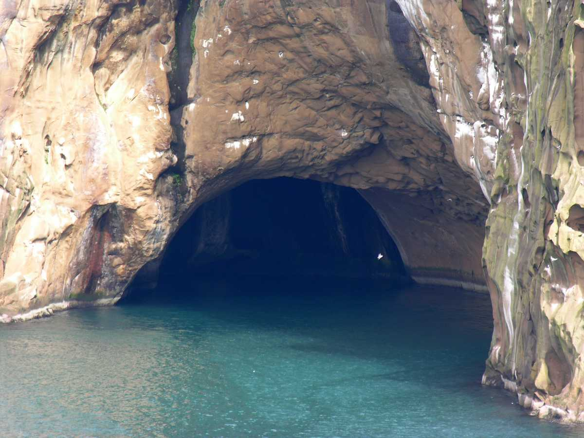 Vestmannaeyjar, Iceland